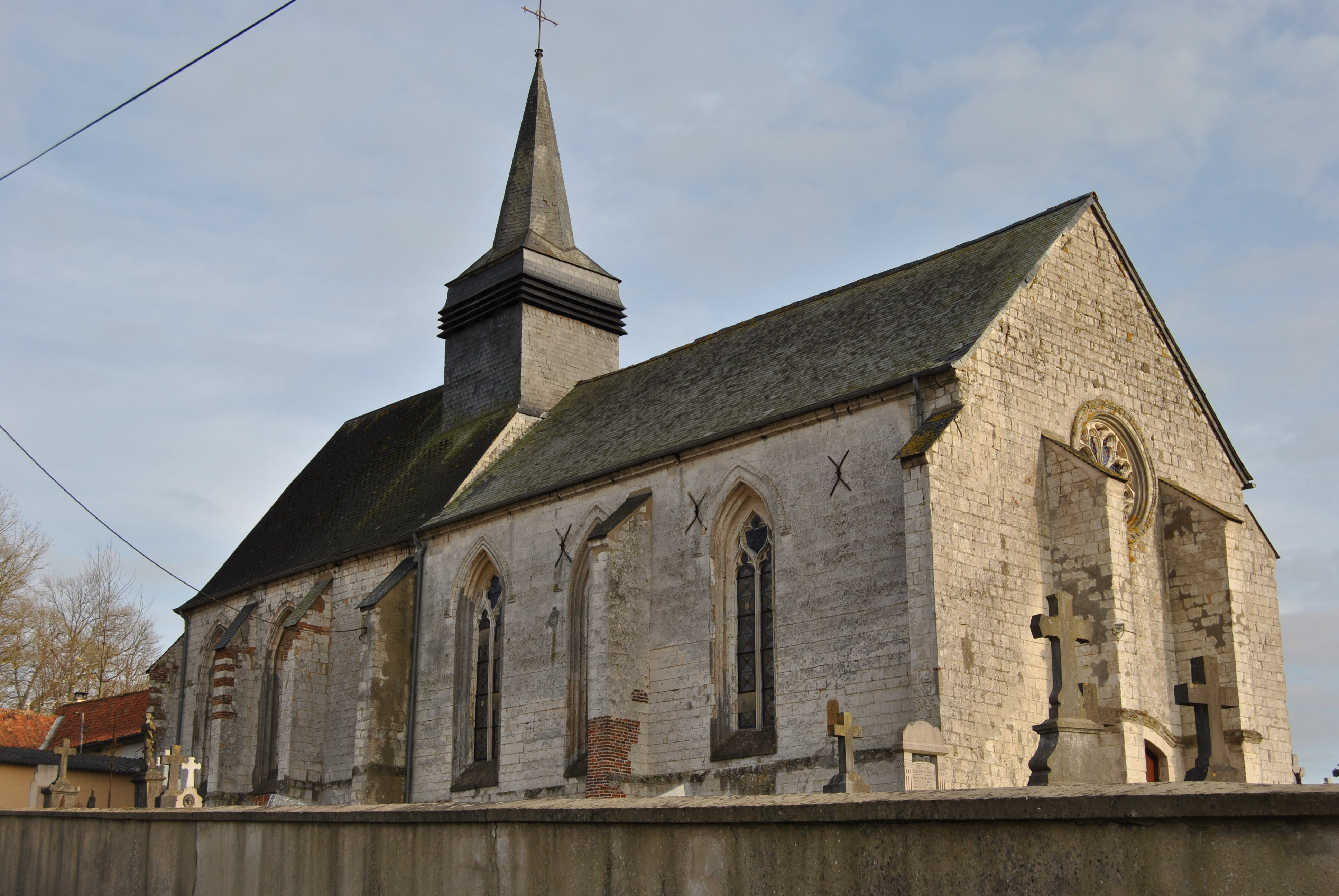 L'église d'Humbert